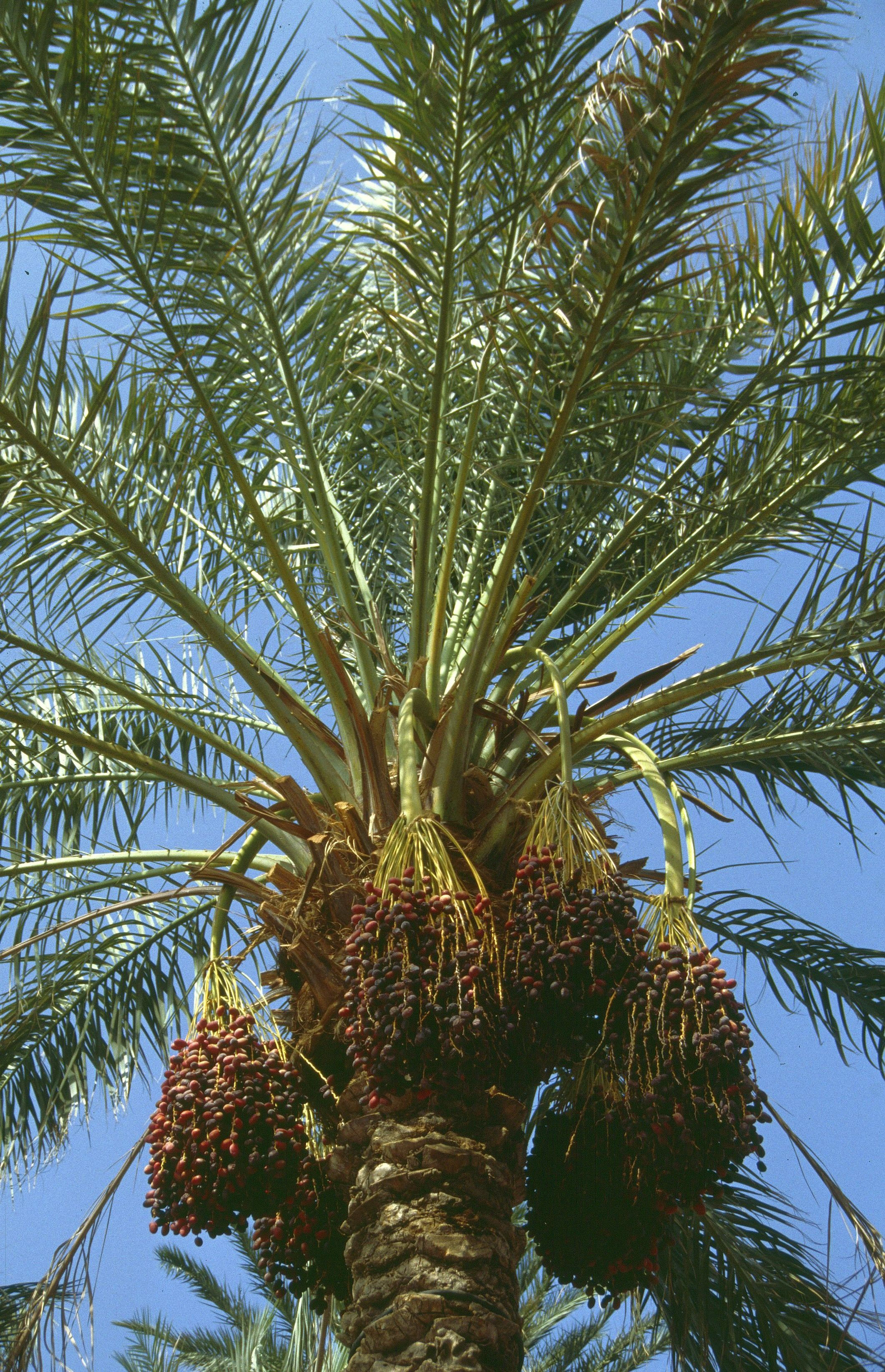 Datteln in Bam